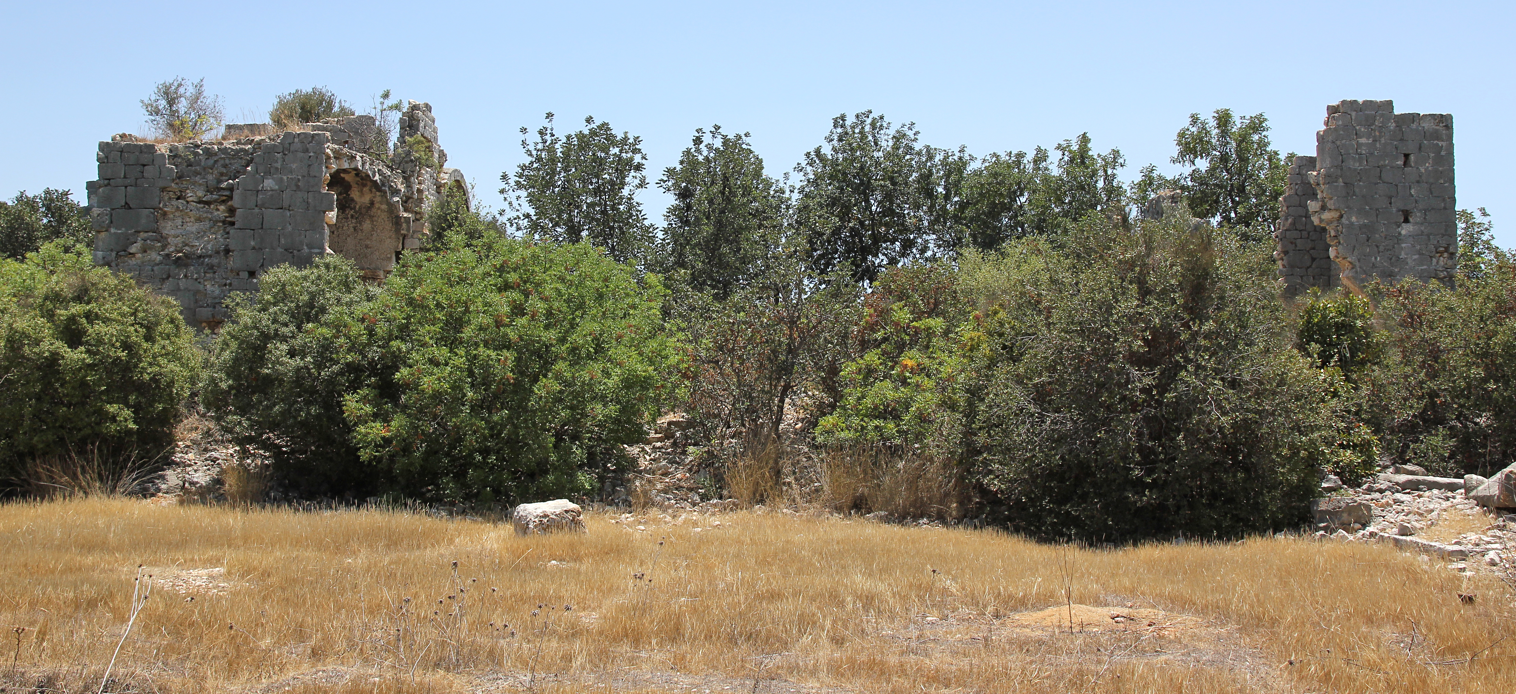 Korykos, archäologischer Fundort in der Südtürkei, Klosterkirche von Norden, links Apsis, rechts Narthex